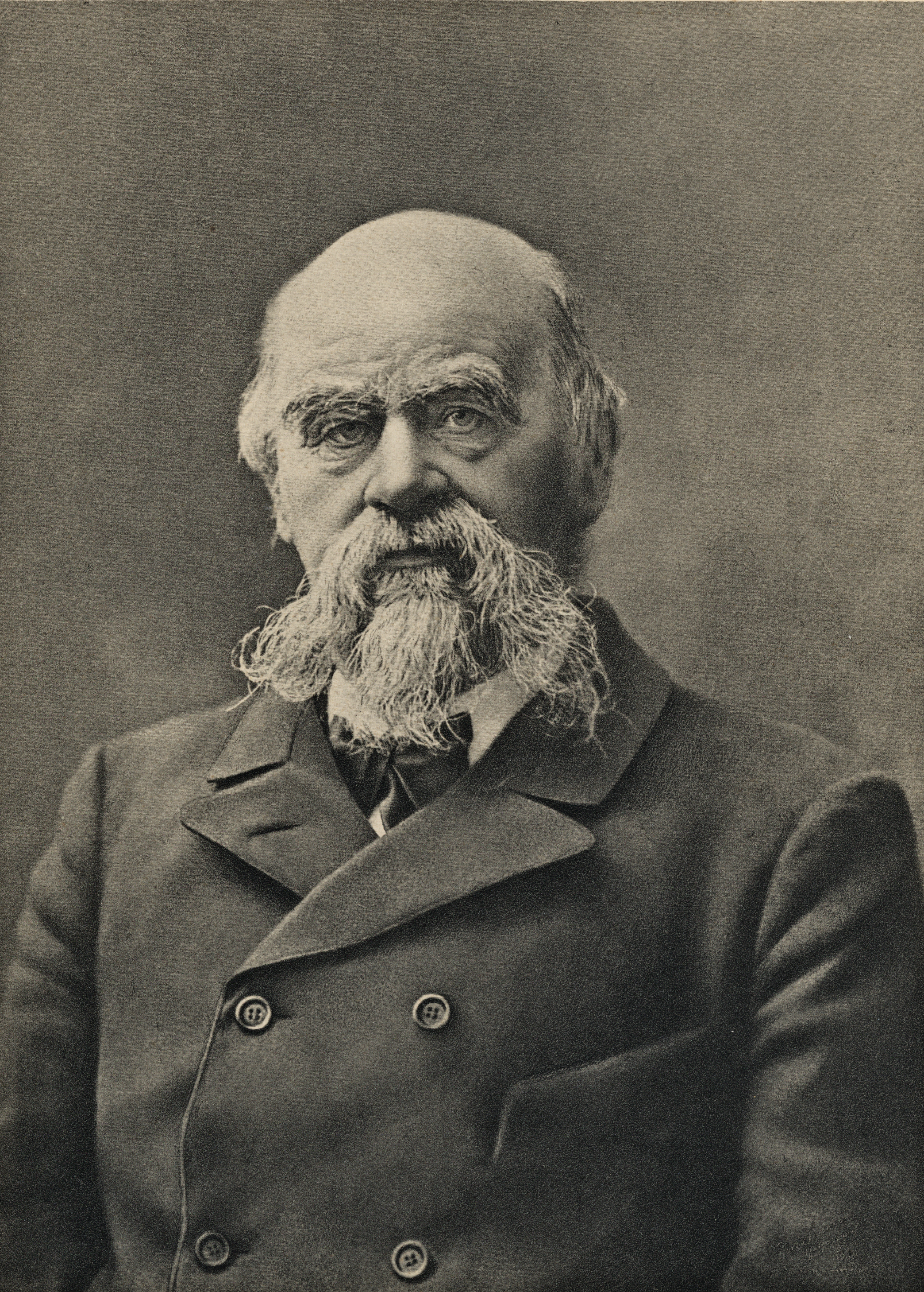 Format: Litografi Utgivelsesår / Published: 1914 (Vore Høvdinger 52) Utgiver / Publisher: F. Bruns Bokhandels Forlag, Trondhjem Eier / Owner Institution: Trondheim byarkiv, The Municipal Archives of Trondheim Arkivreferanse / Archive reference: Ila skole, Va - F9421